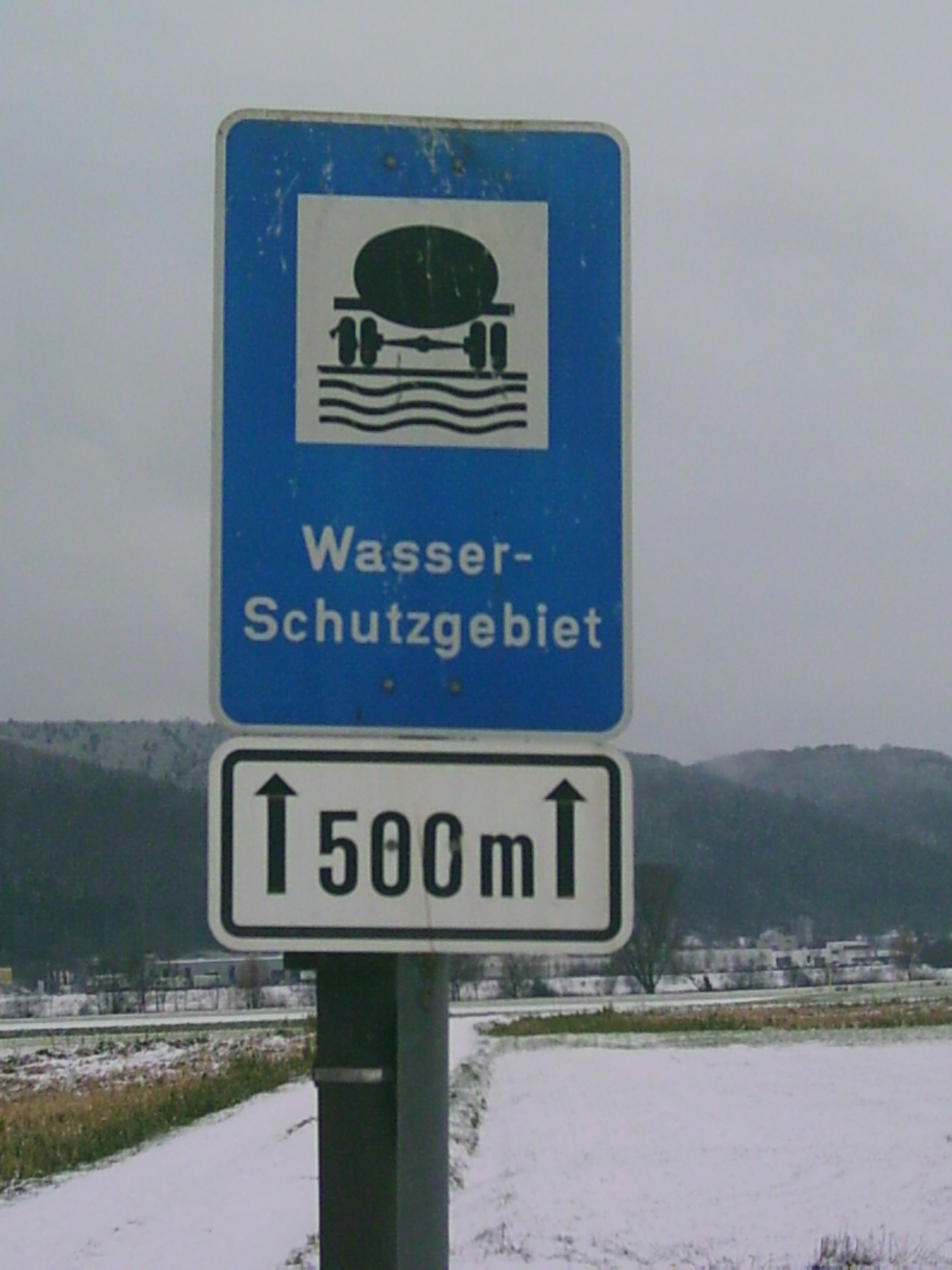 eigenes foto, public domain